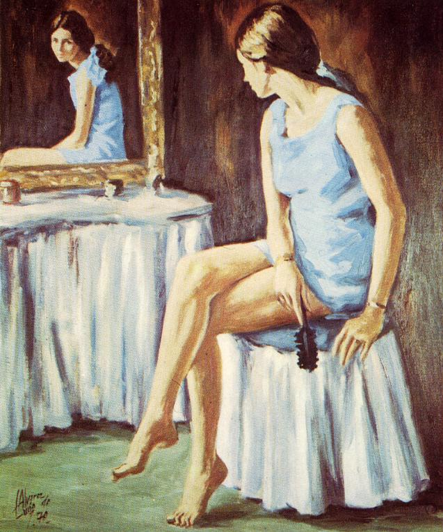 Dibujo del artista Luis Alvarez de Lugo "Indecisión" 1970